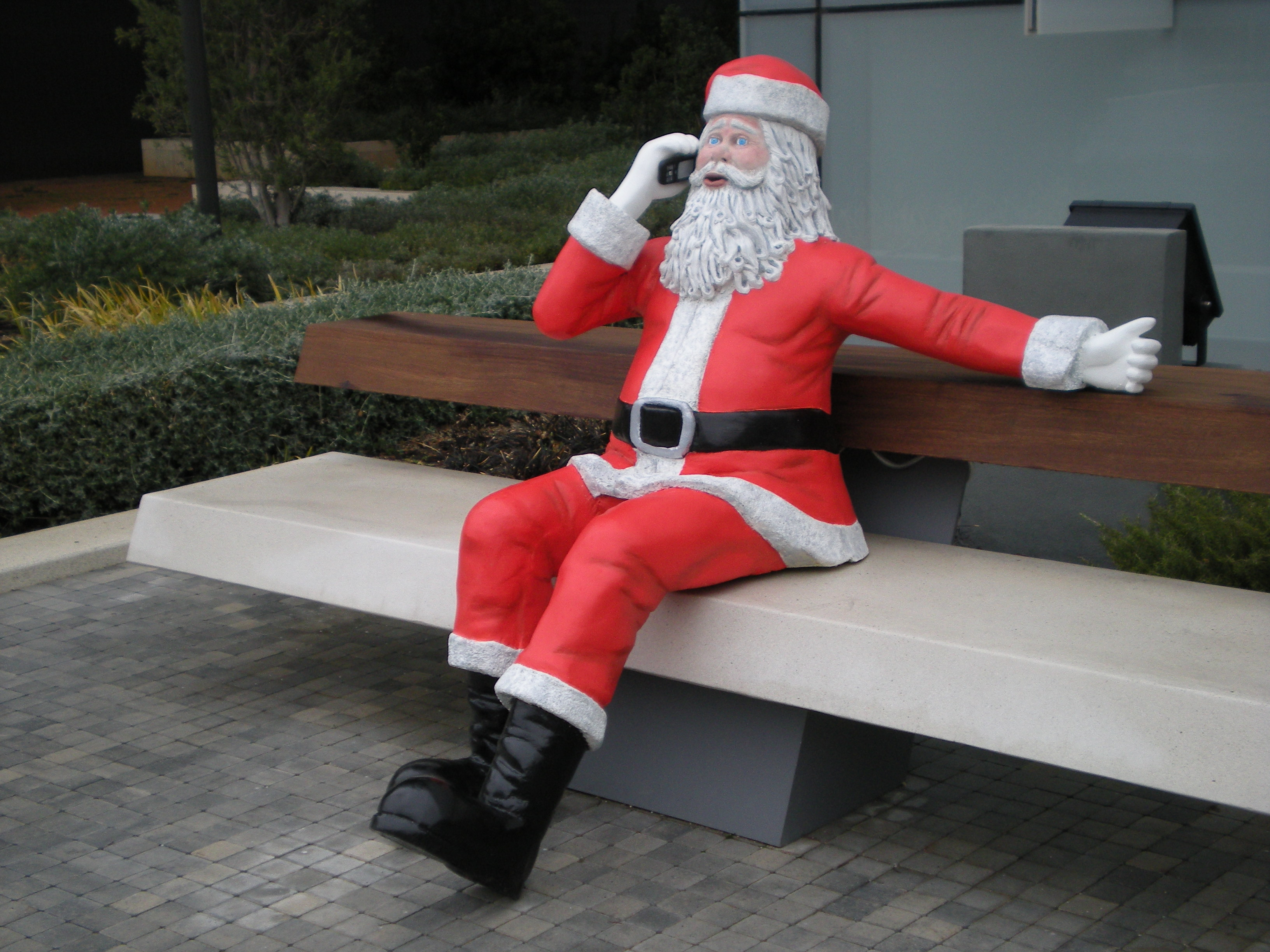 Papa Noel Distrito C Madrid España